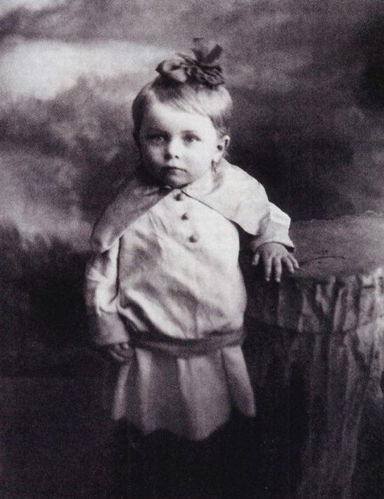 Людмила Целиковская в детстве